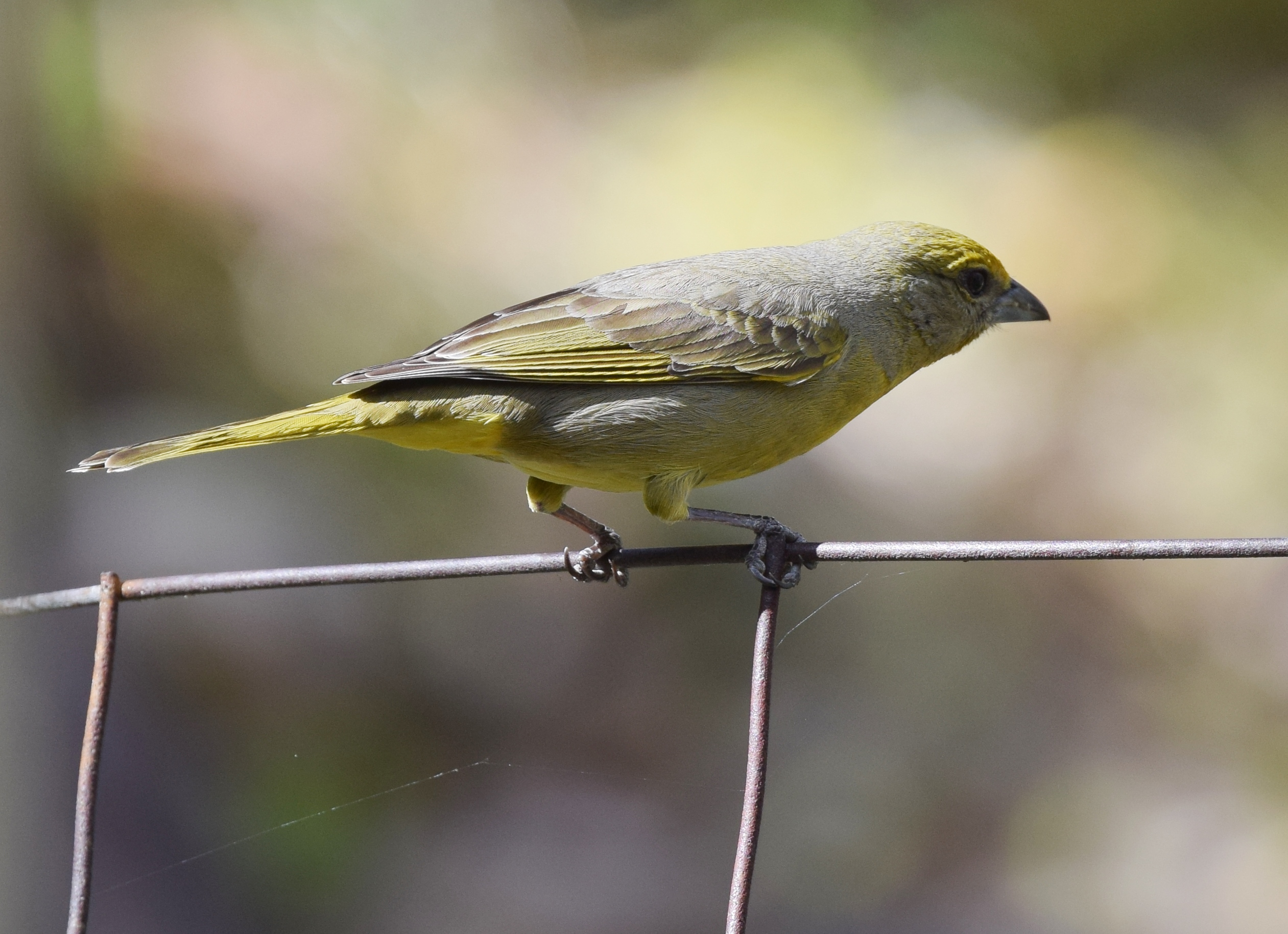 Arizona 4/4/17